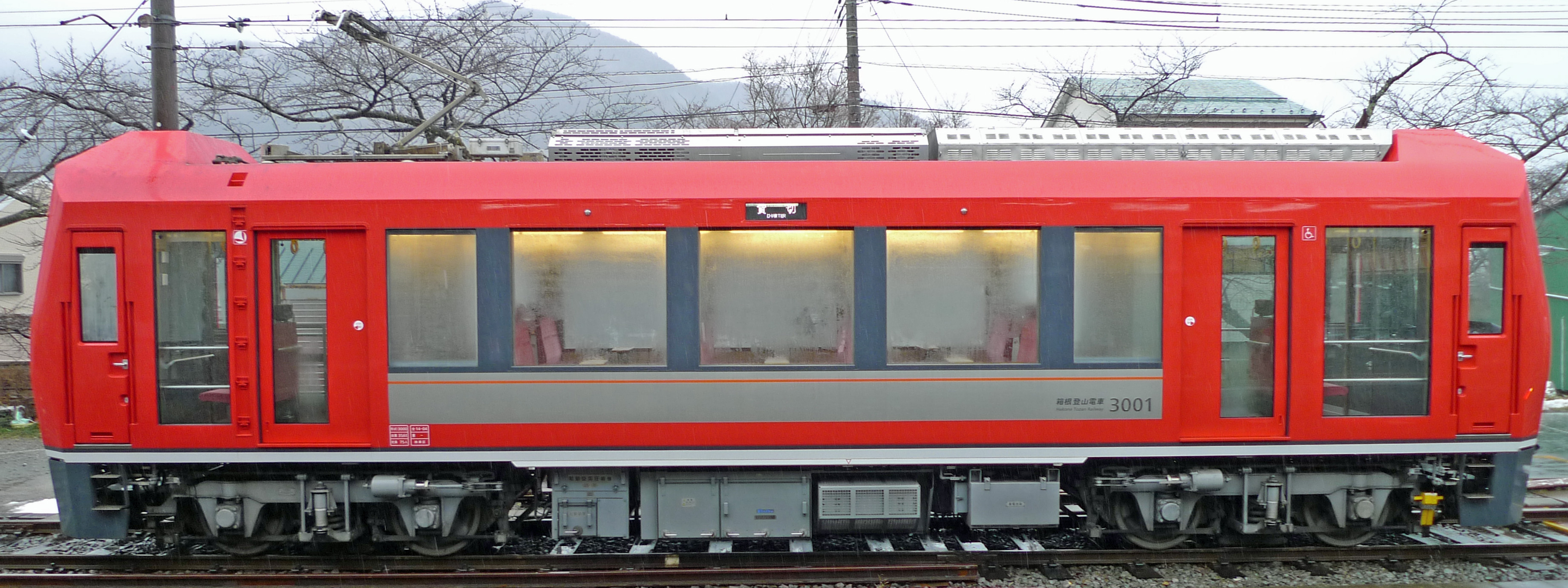 箱根登山鉄道3000形電車「アレグラ号」側面